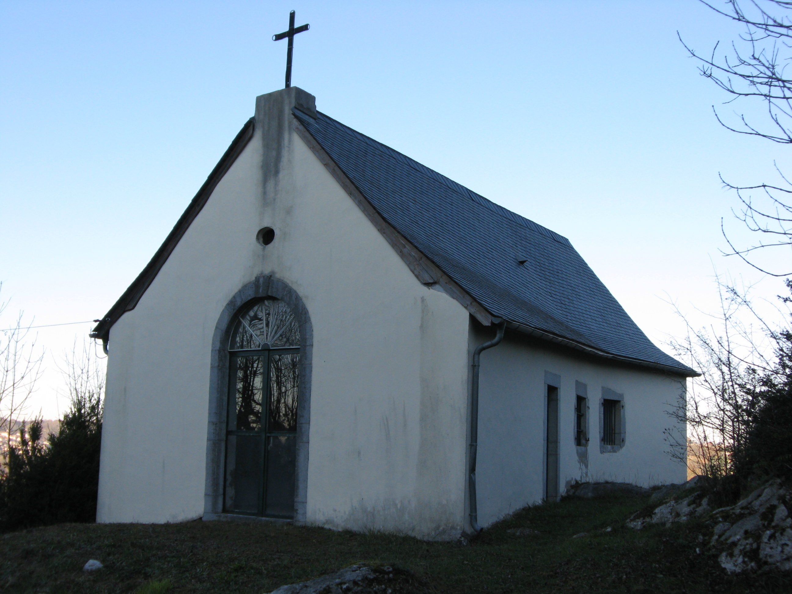 Chapelle dédiée à l'archange Saint Michel (Pyrénées-Atlantiques) (Pyrénées).